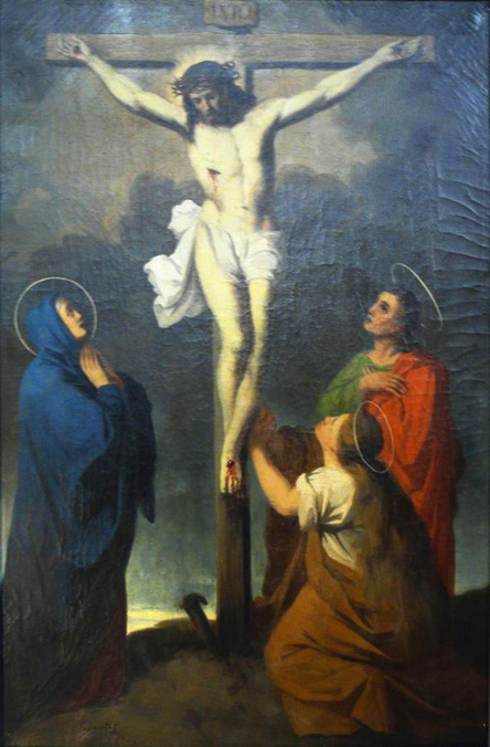 Station 12: Jesus stirbt am Kreuz